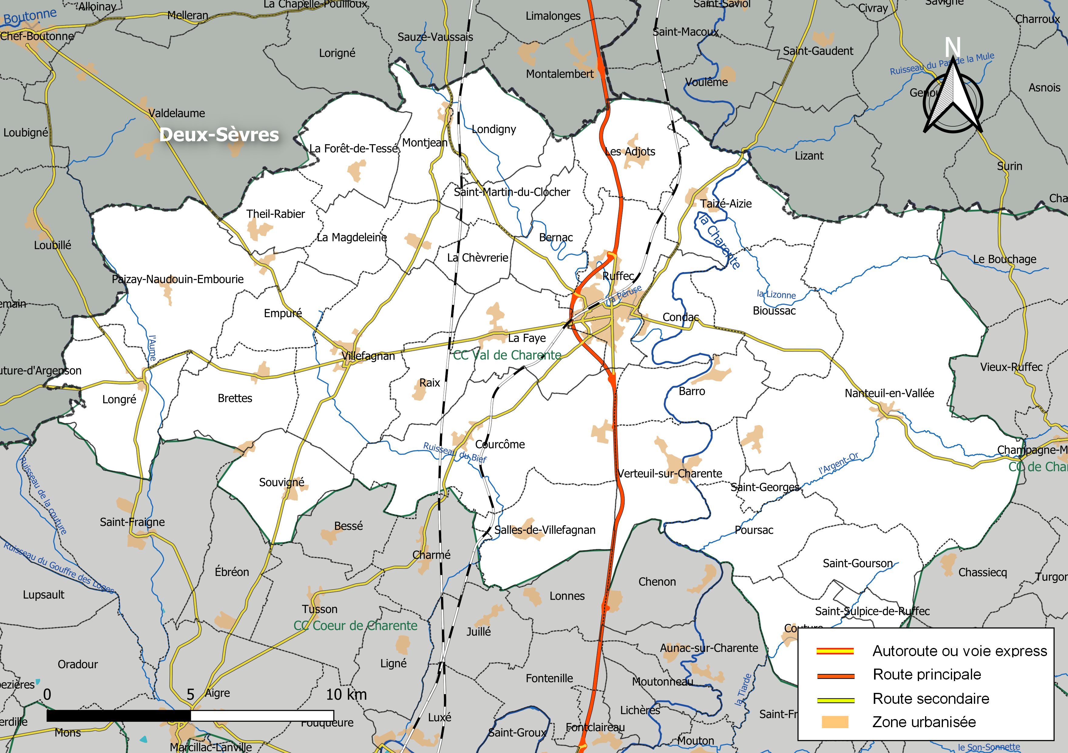 Carte géographique de la Communauté de communes Val de Charente, département de Maine-et-Loir, France. Composition au 1er janvier 2019.